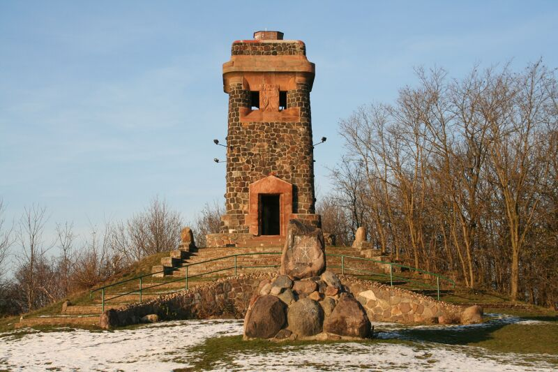 Bismarckwarte bei Irxleben (Dez 2005), Foto selbst gemacht